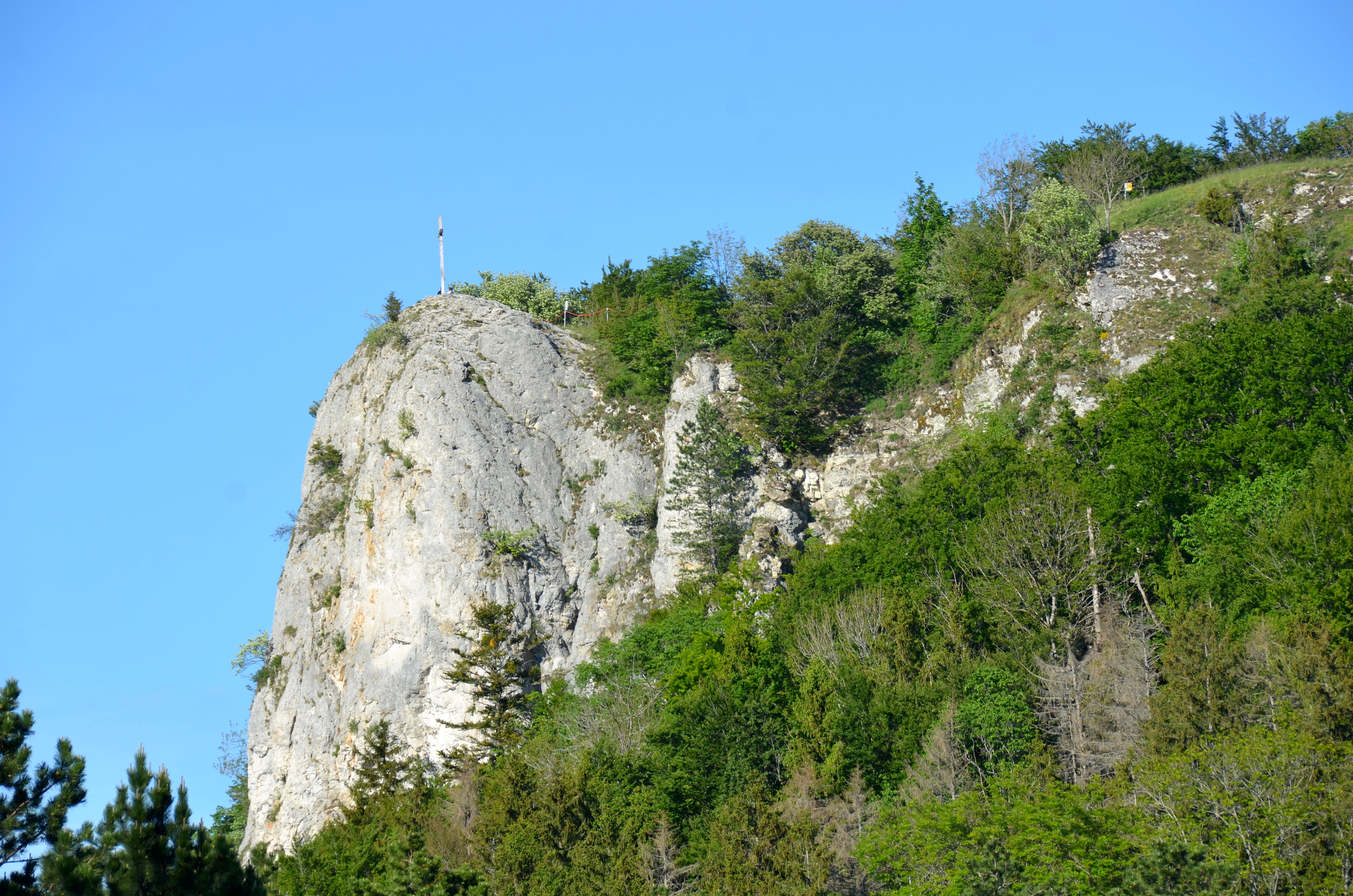 Die Lochen im Naturschutzgebiet Schafberg - Lochenstein (Schwäbische Alb), Schonwald Schafberg-Lochenstein, Naturraum Hohe Schwabenalb, Naturpark Obere Donau, Vogelschutzgebiet Südwestalb und Oberes Donautal, FFH-Gebiet Östlicher Großer Heuberg, Biotop Magerrasen am Lochenstein